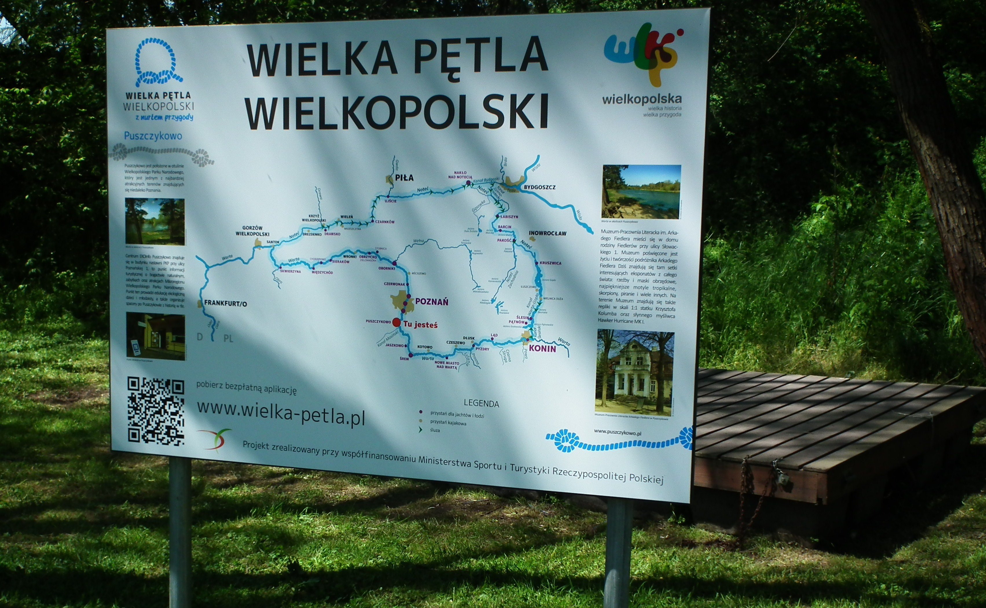 Warta w Puszczykówku.